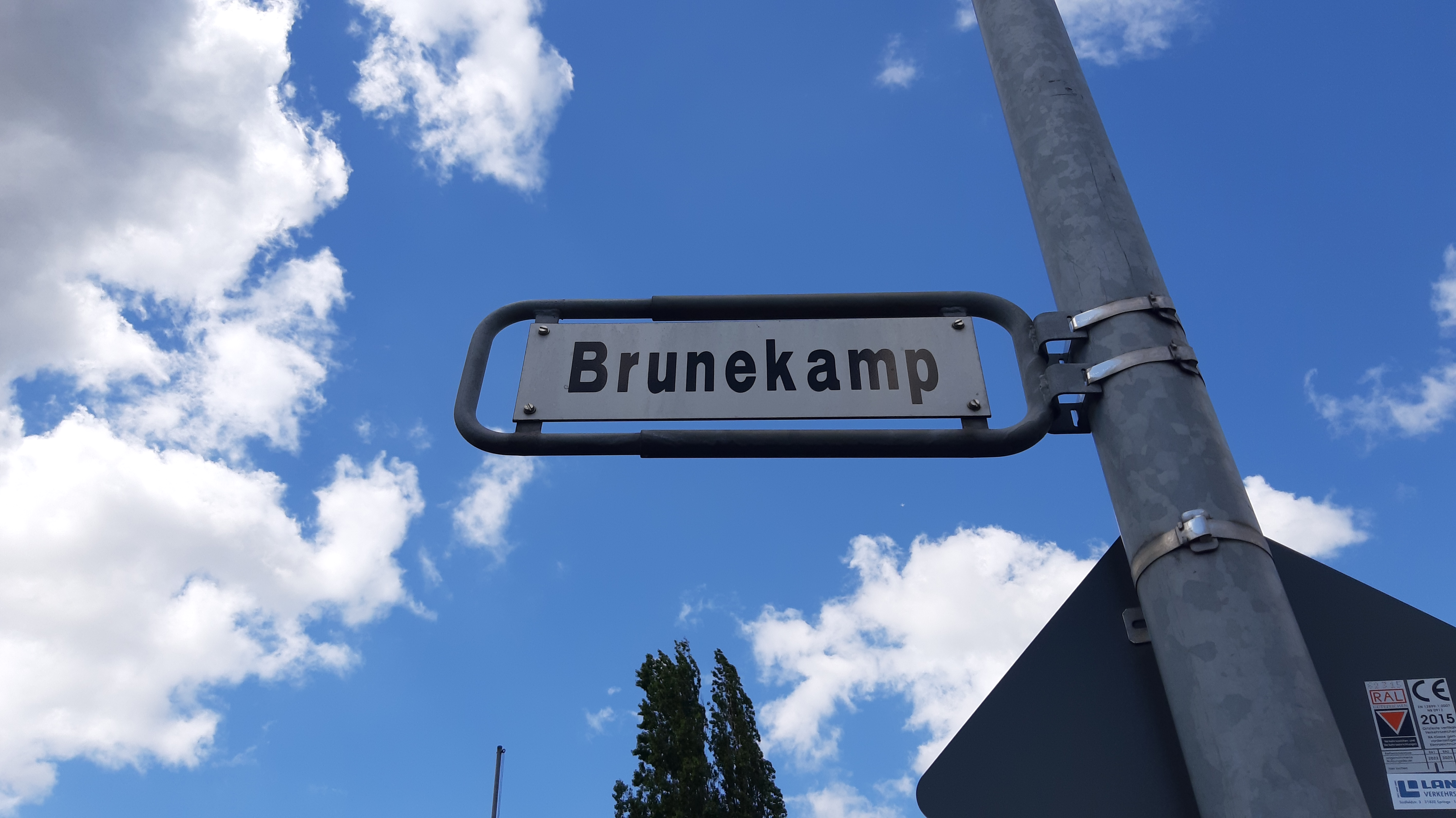 Das Straßeneingangsschild der Straße "Brunekamp" in Hannover-Bothfeld, benannt nach Hermann Brune.